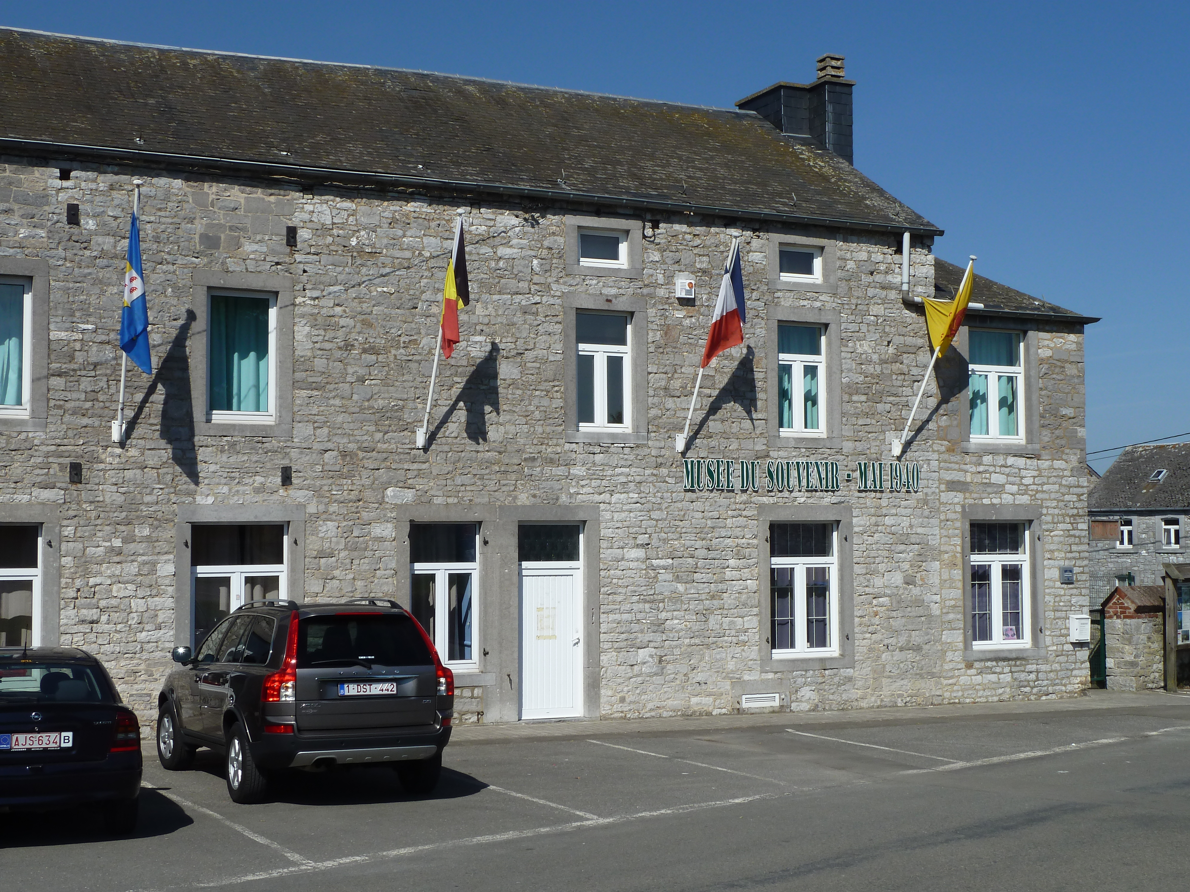 Ecole et musée